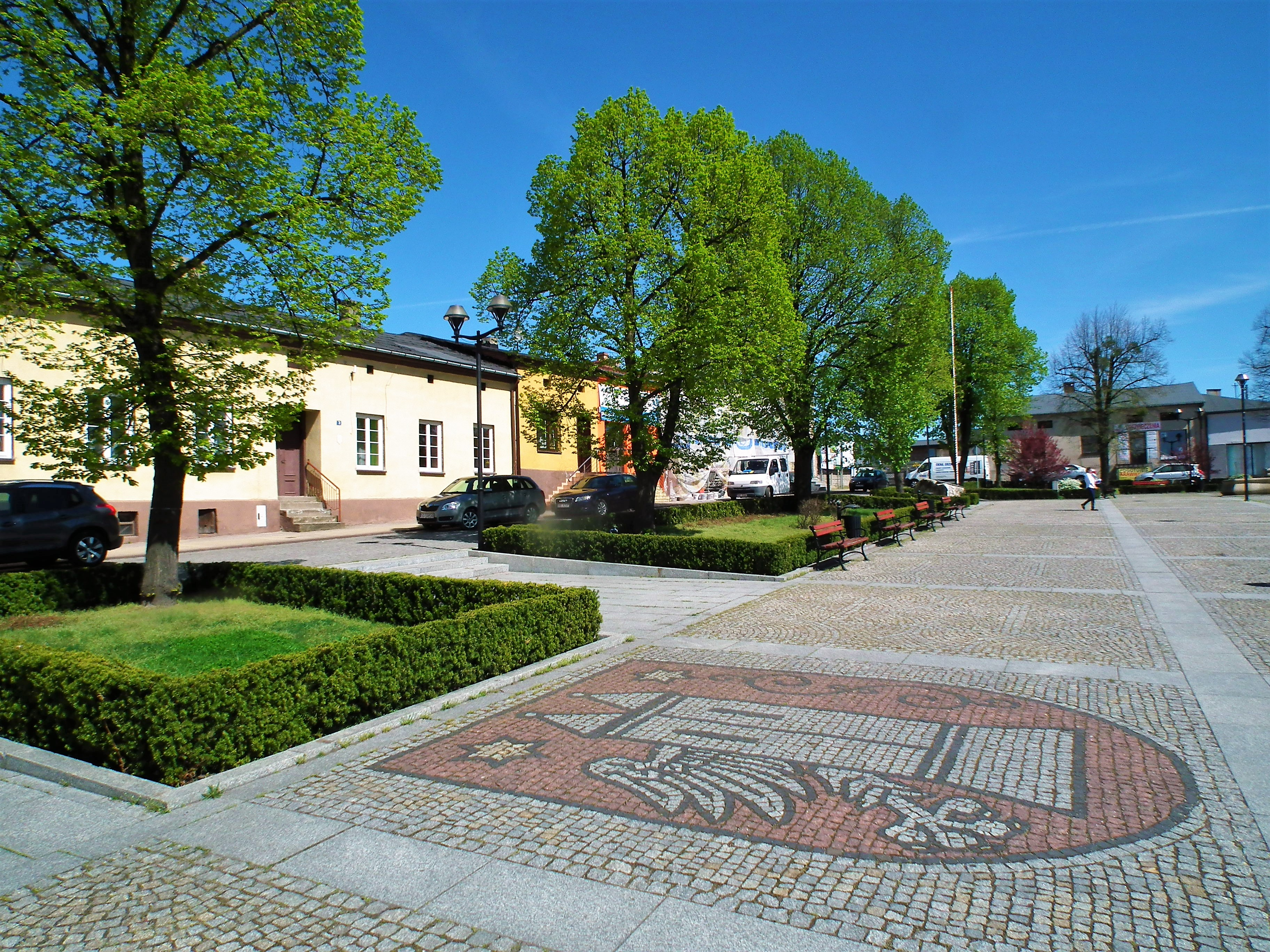 Rynek miejski w Krzepicach.